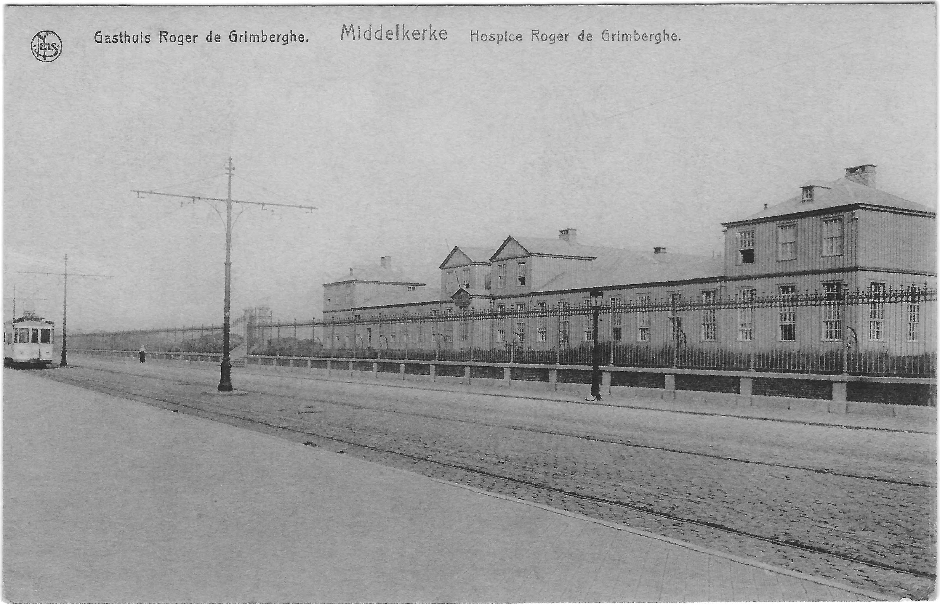 Nels Briefkaart van de Eerste Wereldoorlog. Het gasthuis is niet meer heropend na de de oorlog. De tramlijn naar Middelkerke Bad was al op 1897 geëlektrificeerd.